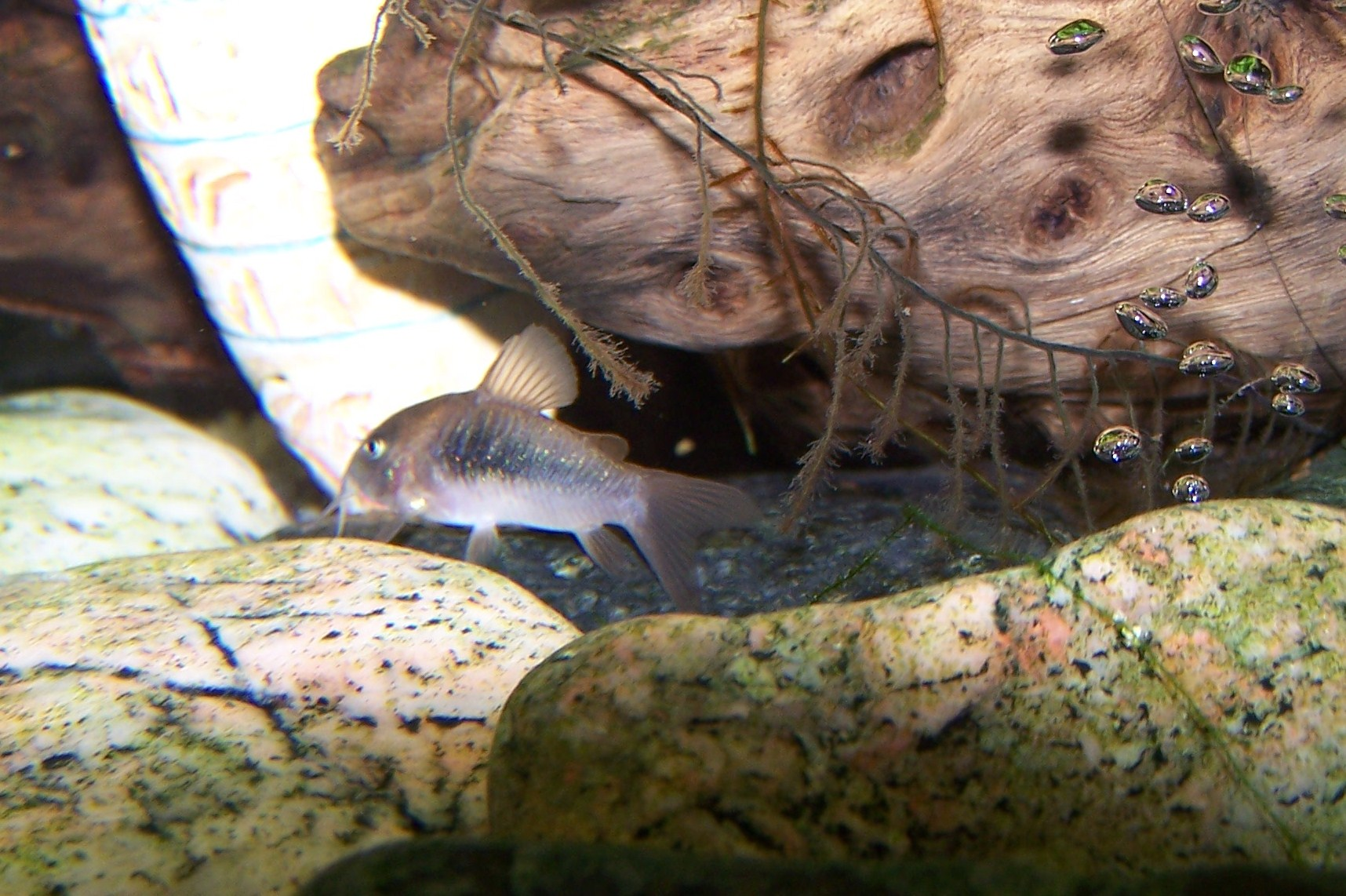 Corydoras pesce pulitore di fondo.